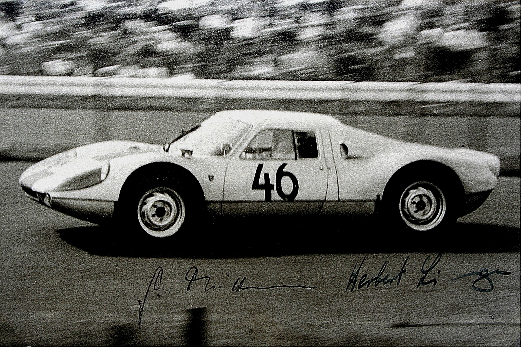 Bildbeschreibung: Herbert Linge auf Porsche 904 Fotograf: Lothar Spurzem Datum: 31.05.1964 beim 1000-km-Rennen auf dem Nürburgring